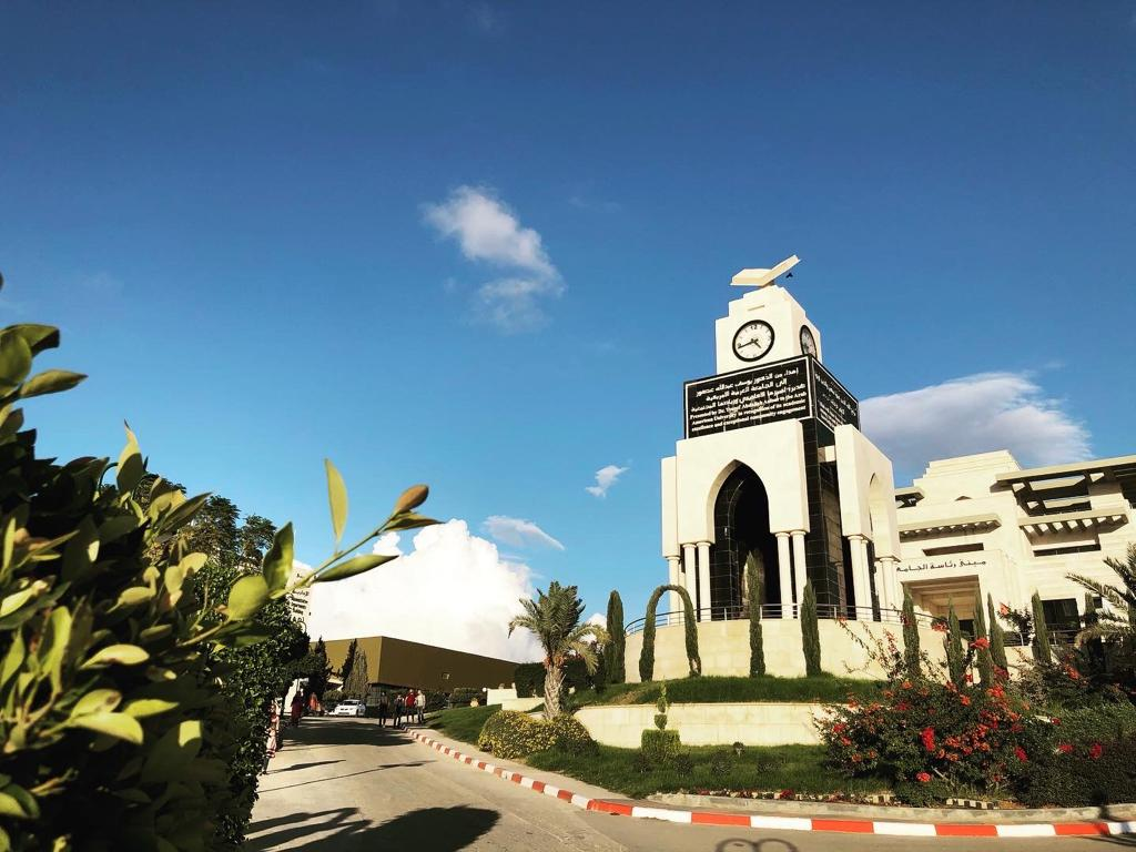 منظر لمدخل الجامعة